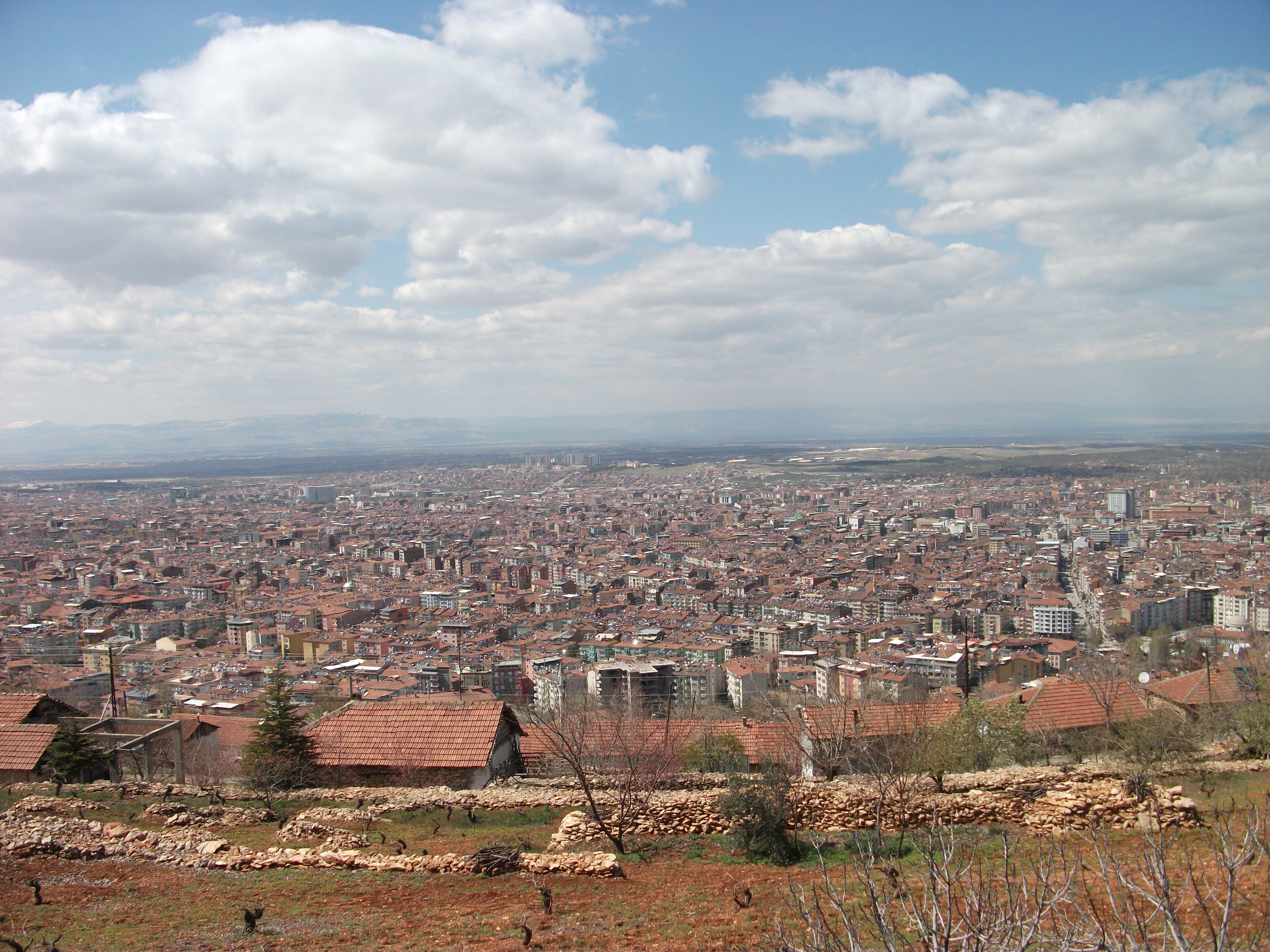 malatya genel camlibel